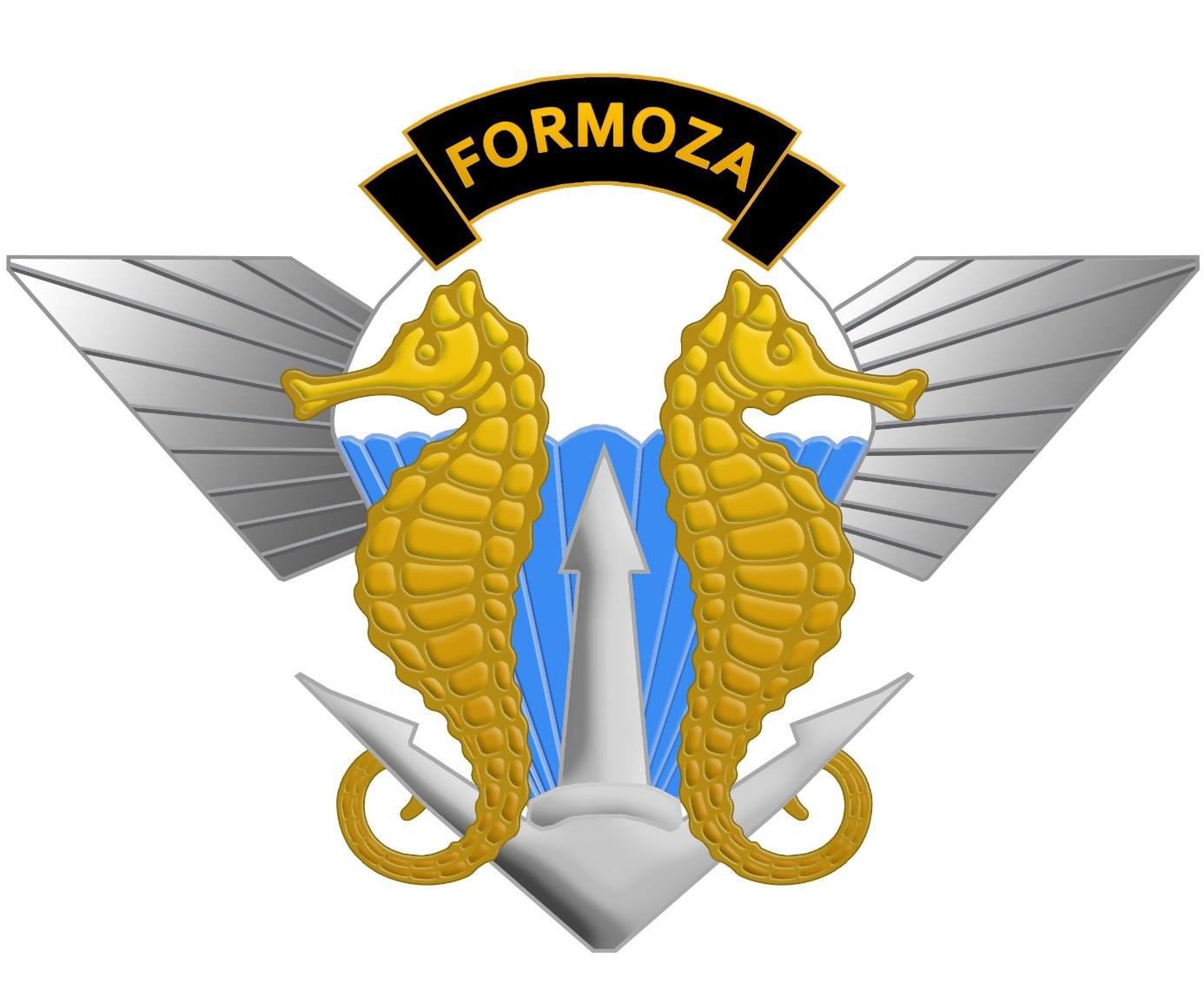 Jednostka Wojskowa Formoza – odznaka pamiątkowa – 2019, Polska.